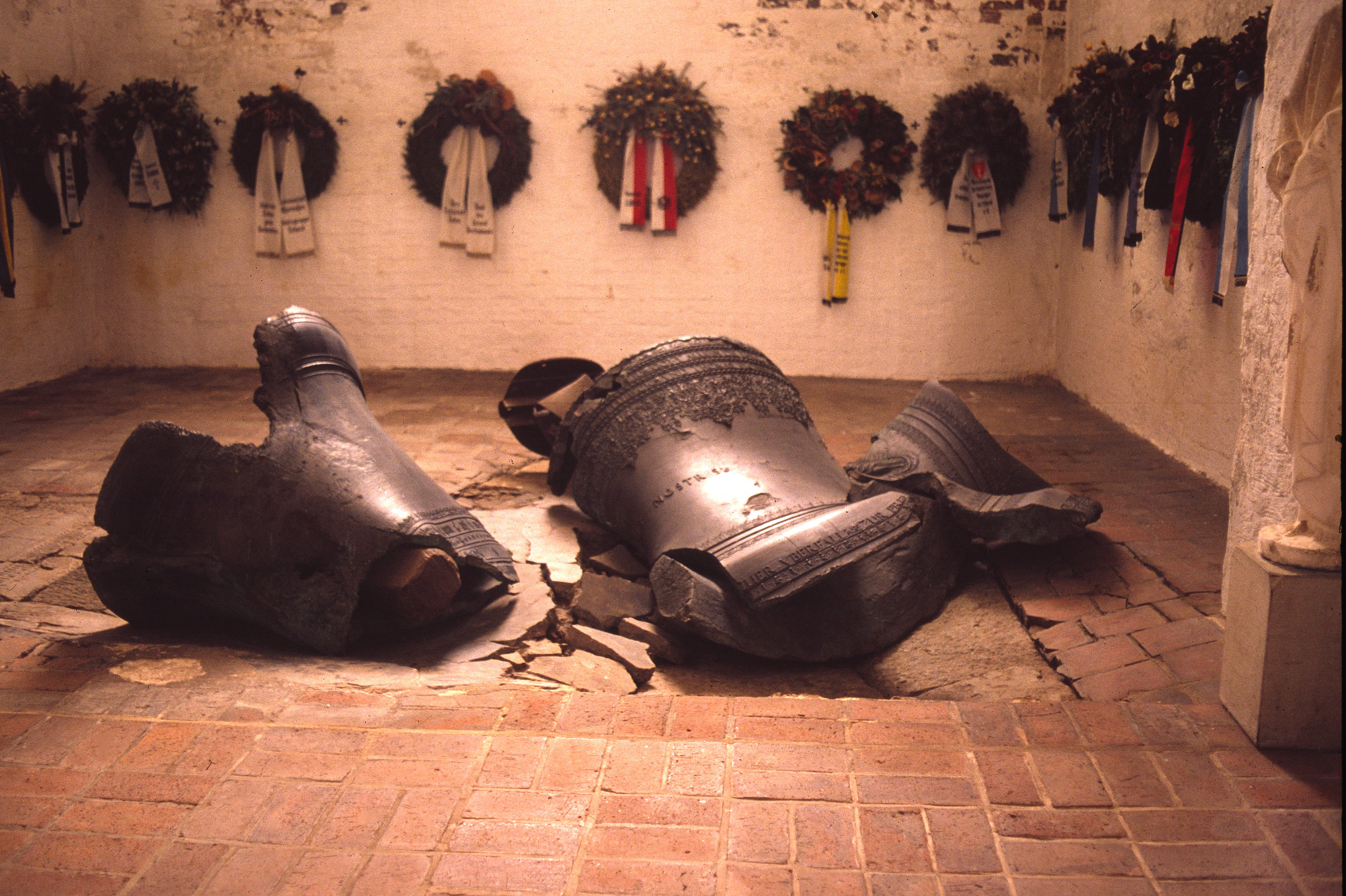 Lübeck-Glocken-Marienkirche